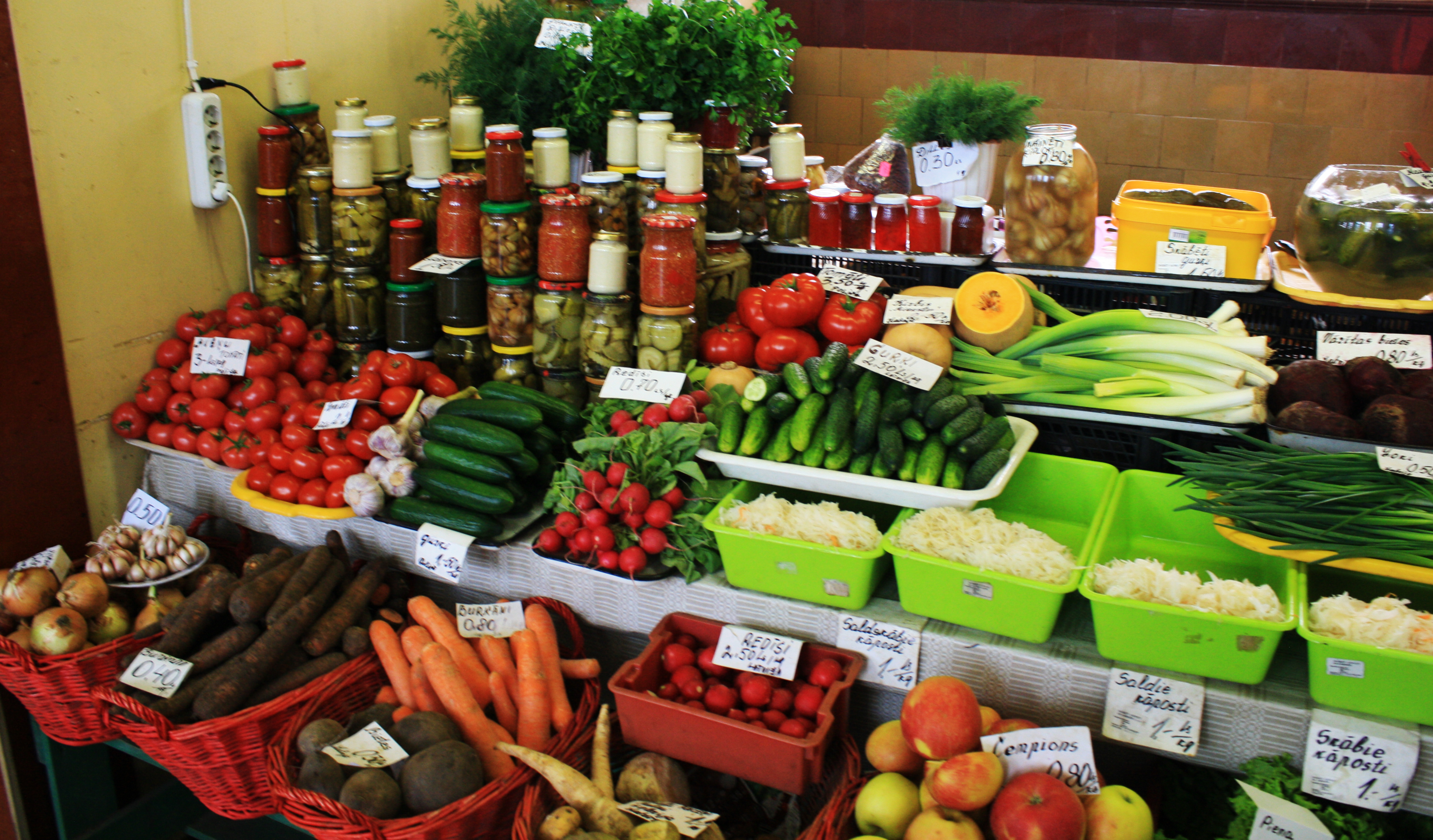 Рига (Латвия) Видземский рынок - прилавок "овощи-фрукты" в центральном павильоне